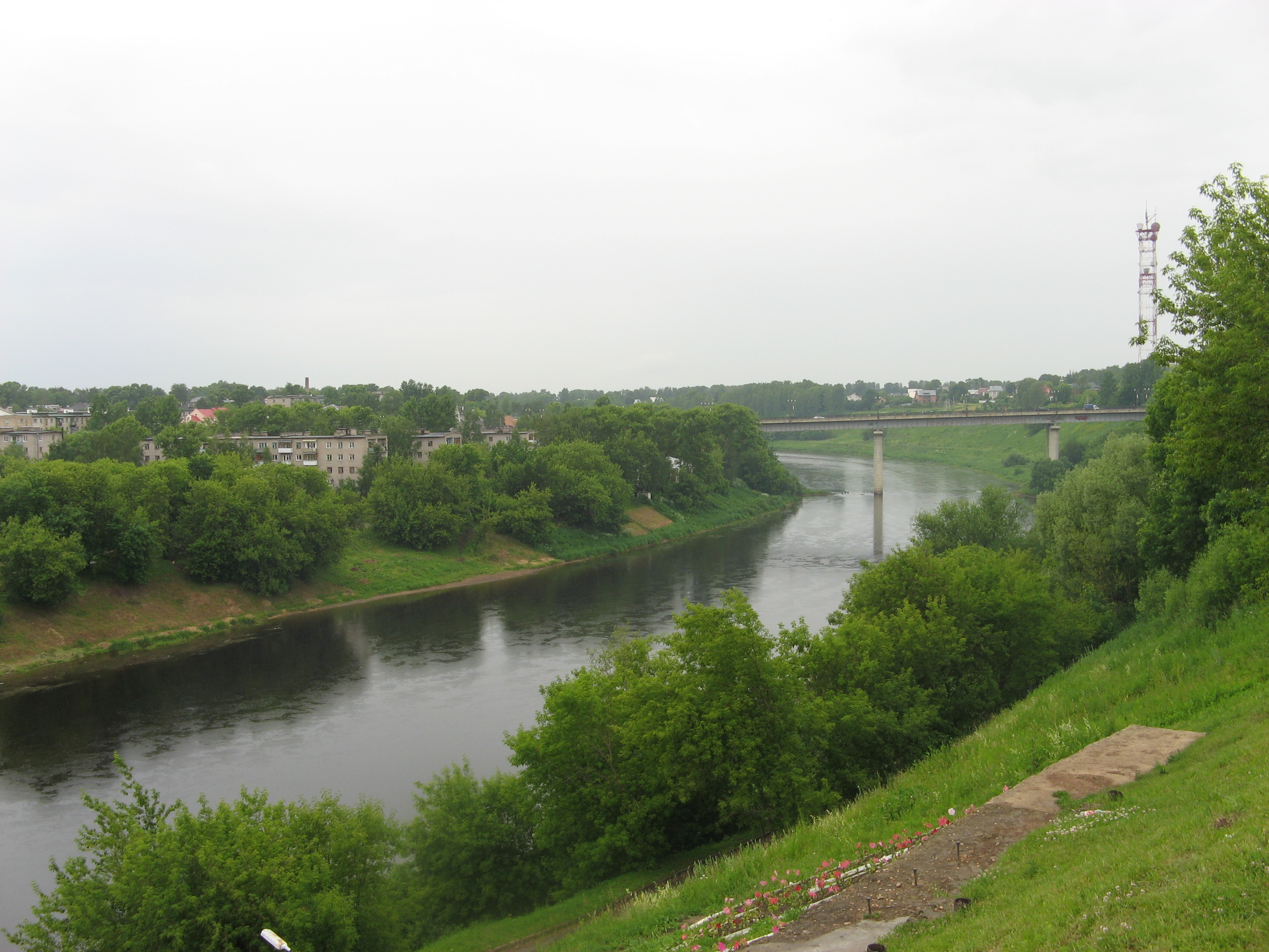 Вид на новый мост